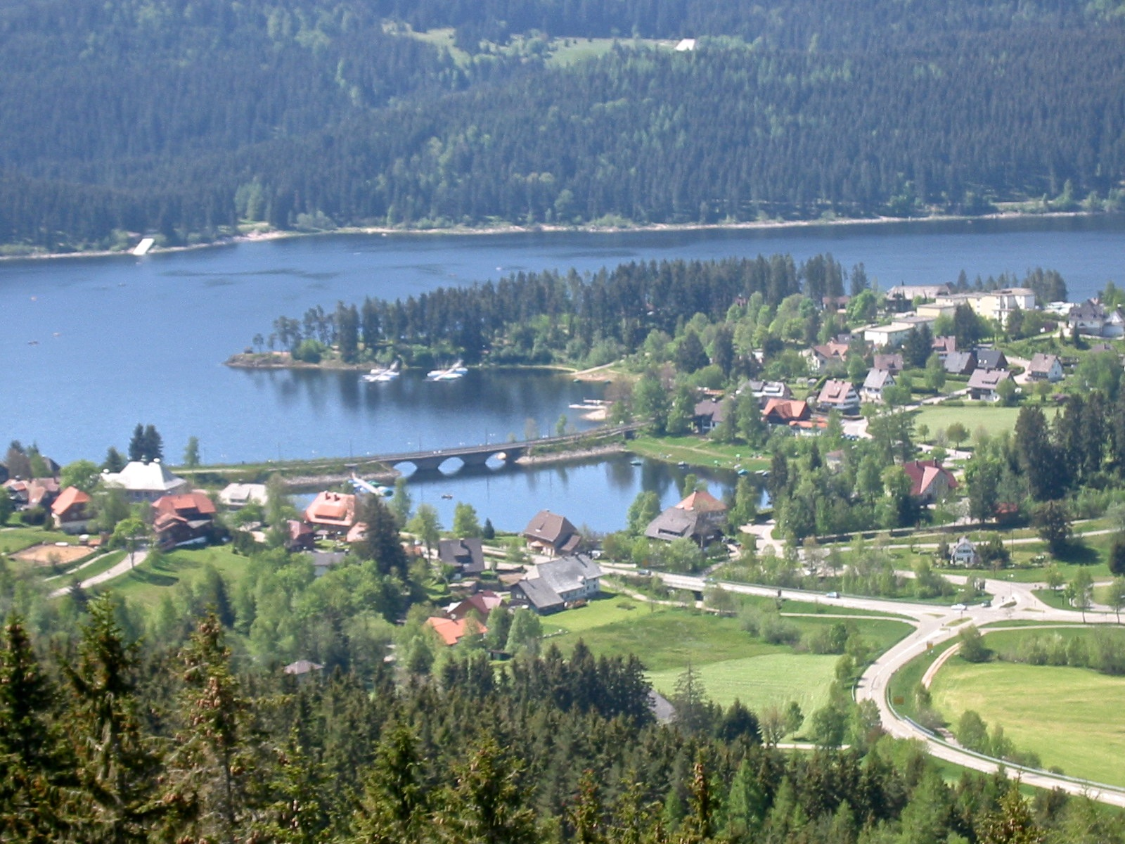 Schluchsee, Lake Schluchsee